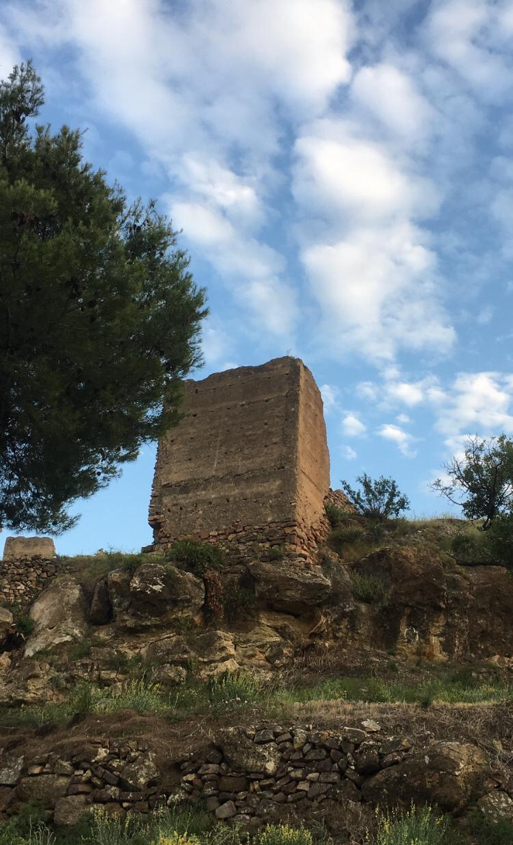 La imagen muestra un de la torres del Castillo de Segart (Valencia)